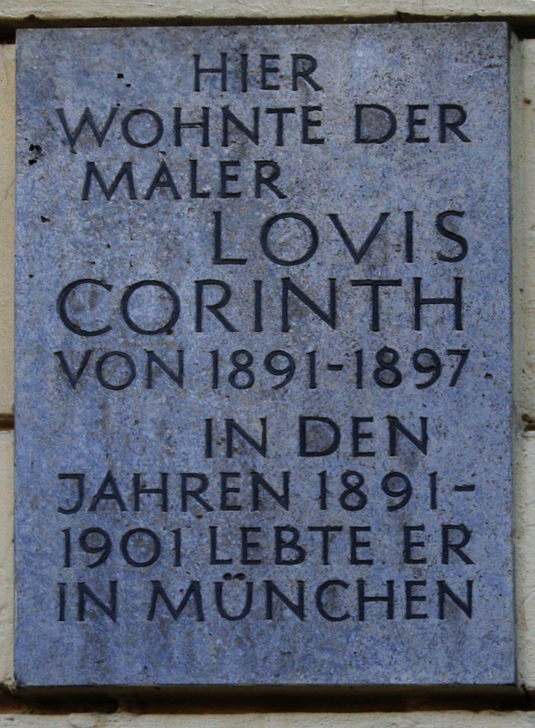 Gedenktafel für den Maler Lovis Corinth in der Giselastraße in München Hier wohnte der Maler Lovis Corinth von 1891 - 1897. In den Jahren 1897 - 1901 lebte er in München (Foto wurde beschnitten, entzerrt und farbkorrigiert)